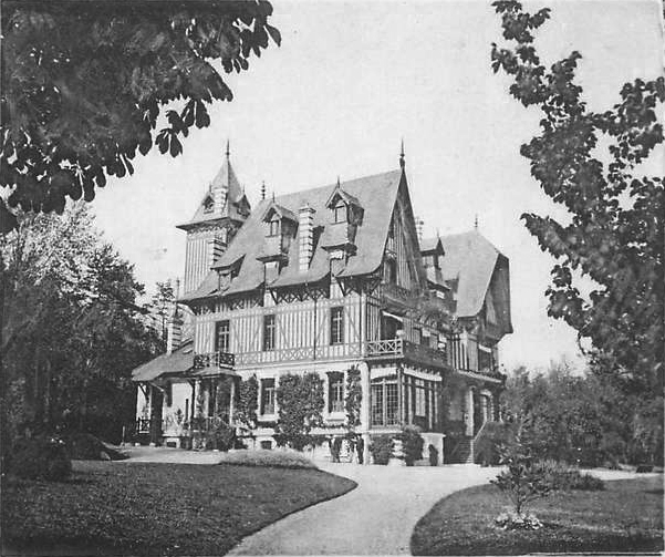 Château des Fougères, Avon, France